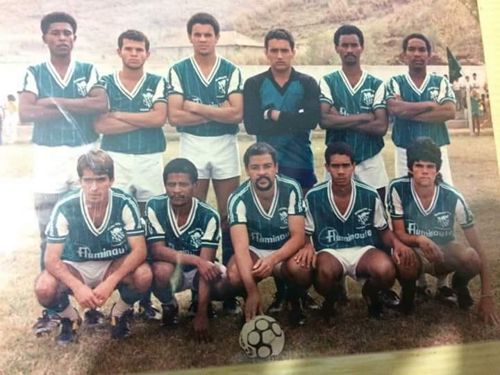 Floresta Cambuci